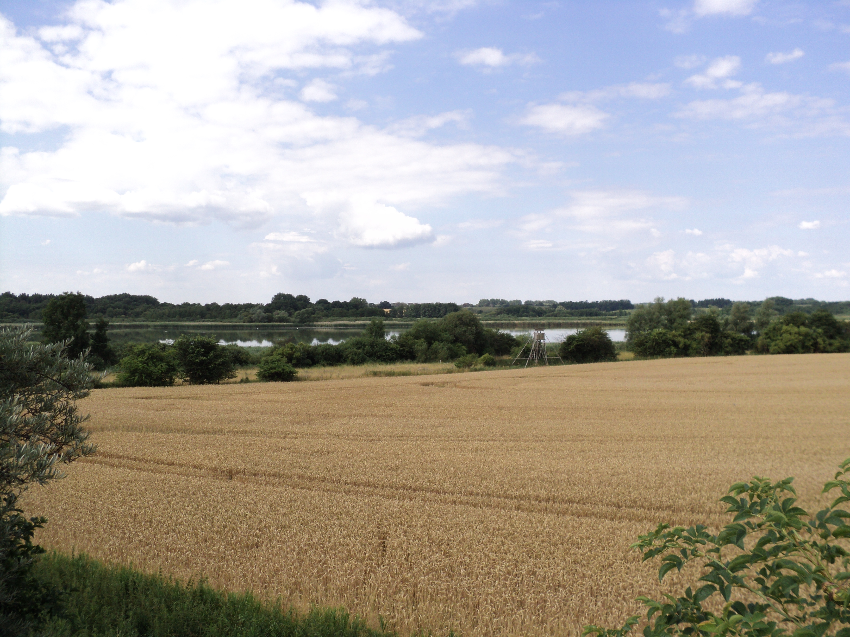 Malliner See, südlicher Bereich, gesehen vom alten Bahndamm am Ostufer